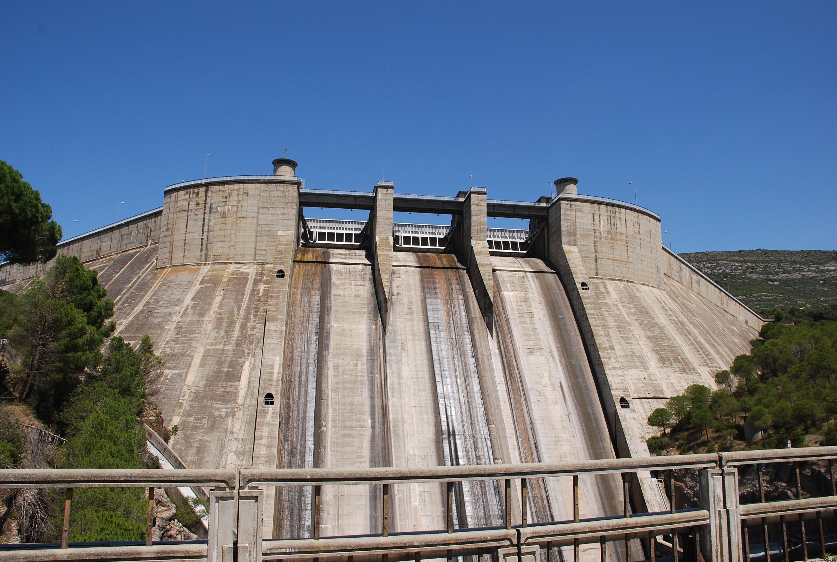 Presa del embalse de El Grado (Huesca, España)